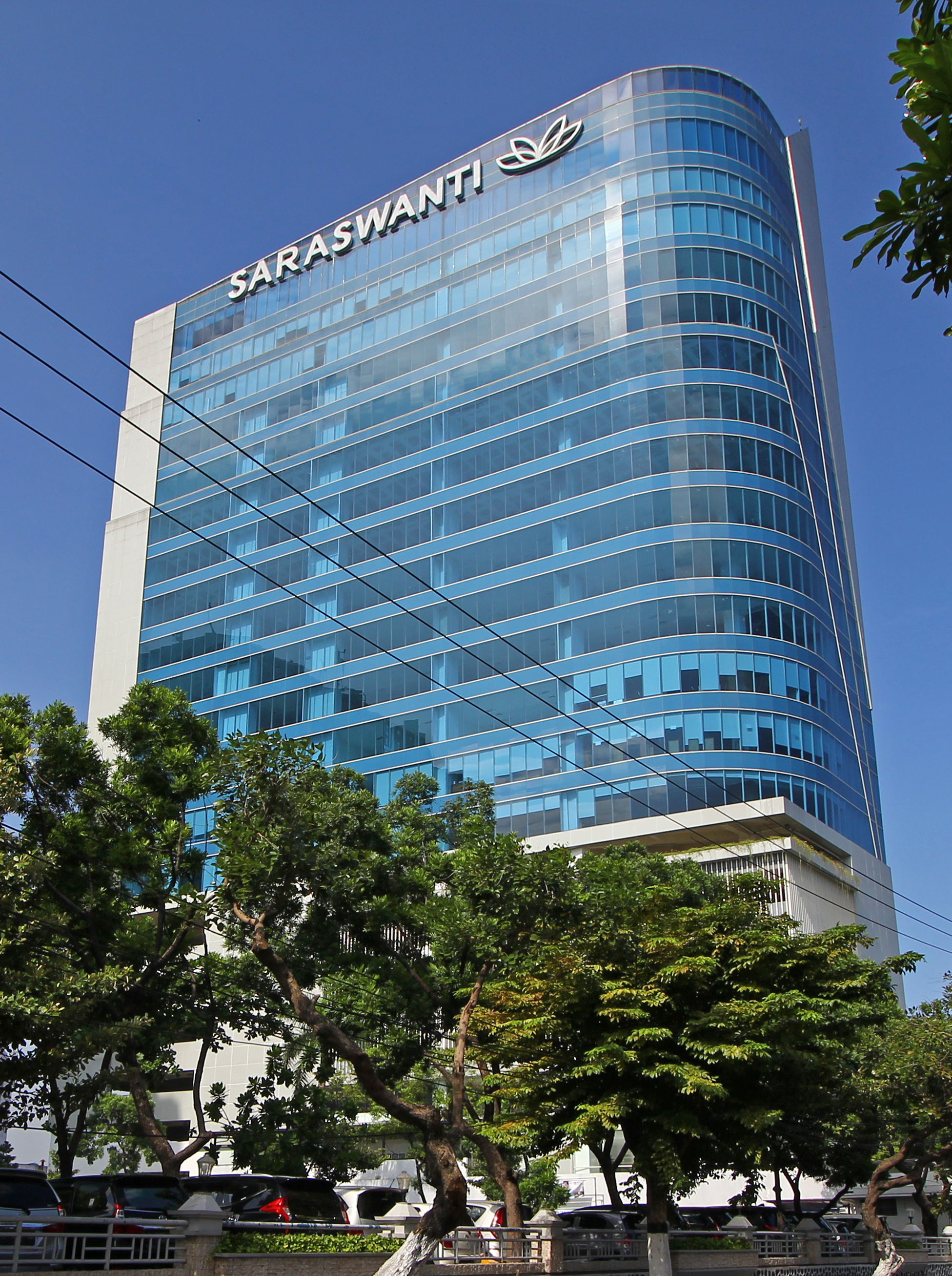 Kantor Pusat Saraswanti Group